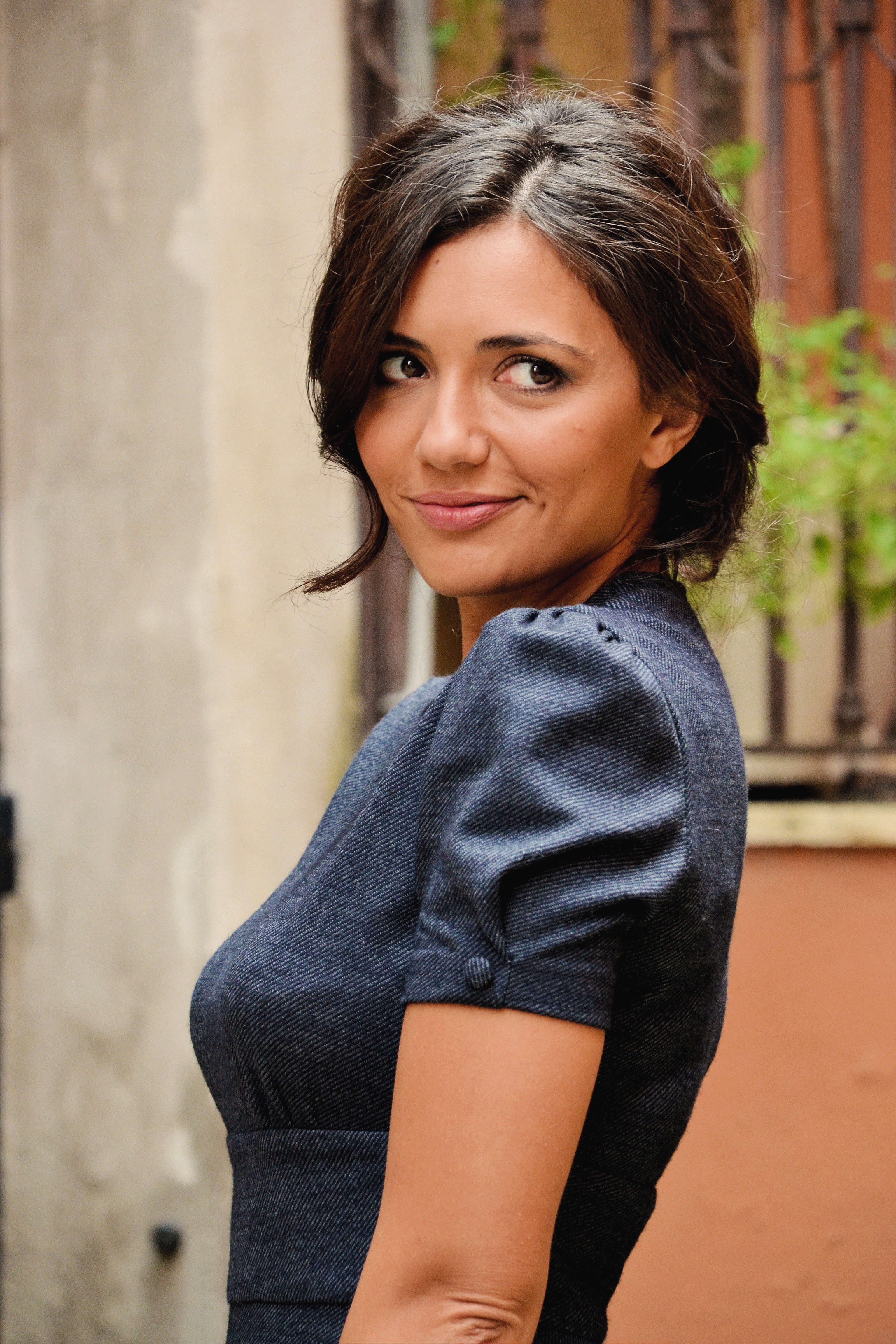 L'attrice italiana Serena Rossi alla conferenza stampa del film Song'e Napule (2014).